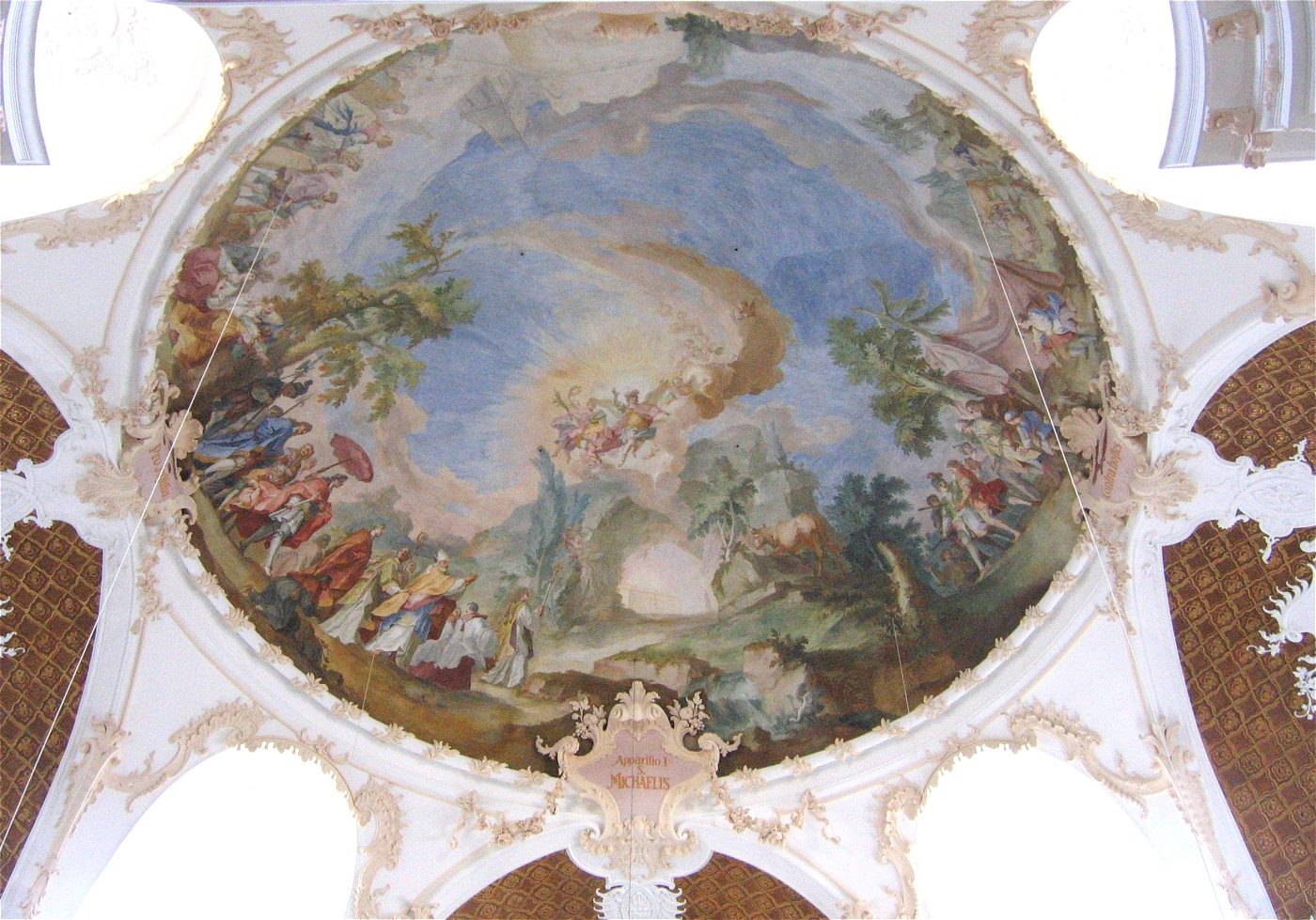 St. Michael Berg am Laim, München, Gewölbefresko